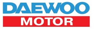 Logotipo Daewoo Motor